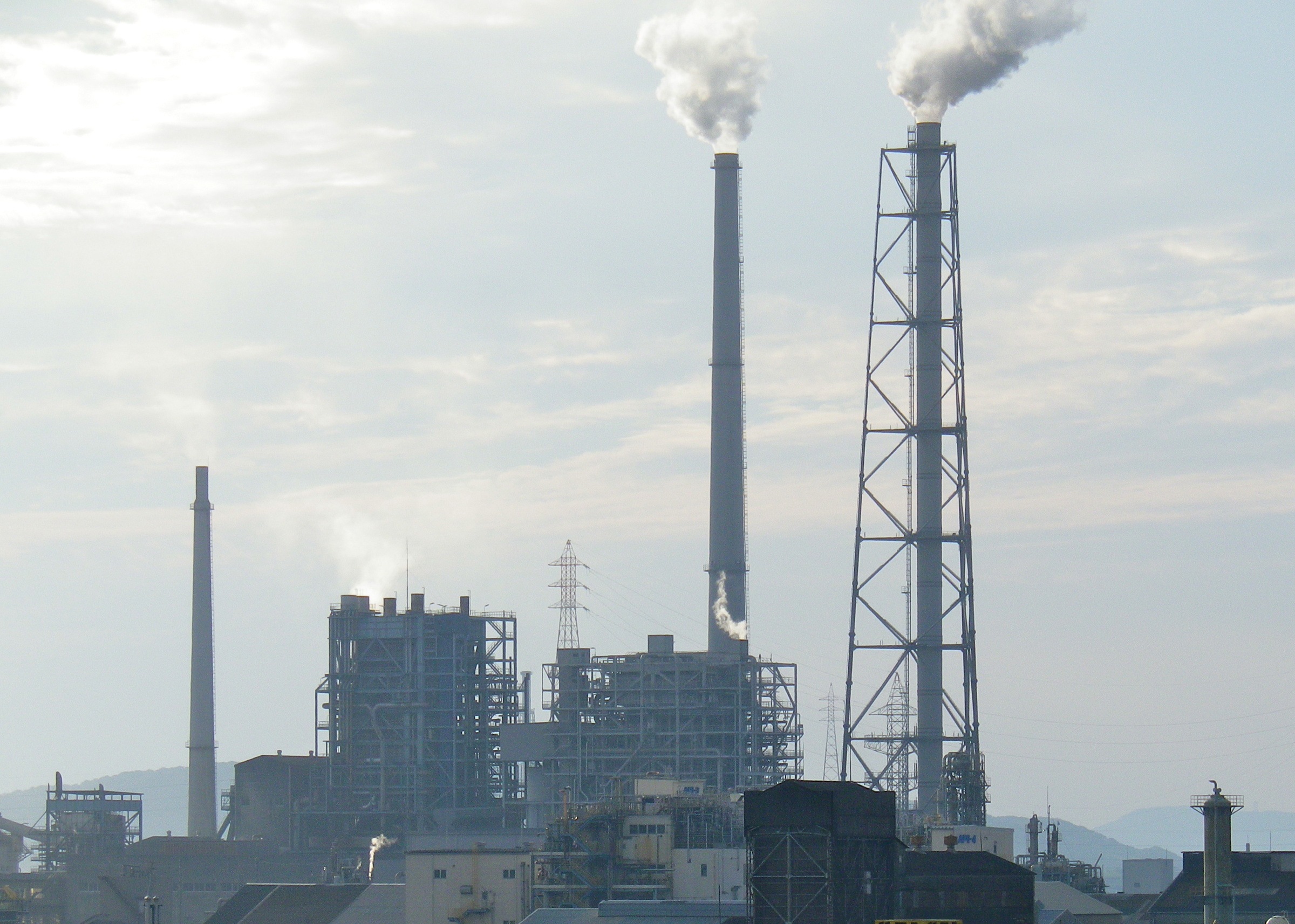 山口県宇部市。宇部興産 ユービーイーパワーセンター発電所。